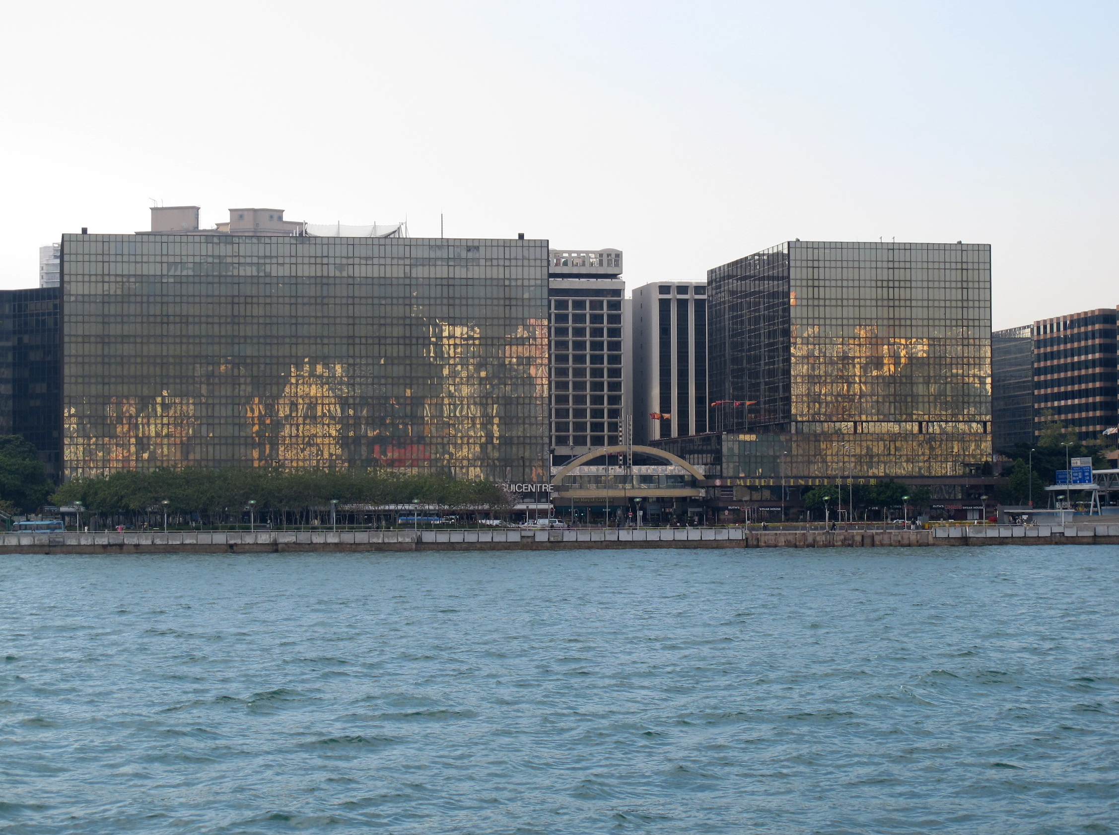 Tsim Sha Tsui Centre & Empire Centre